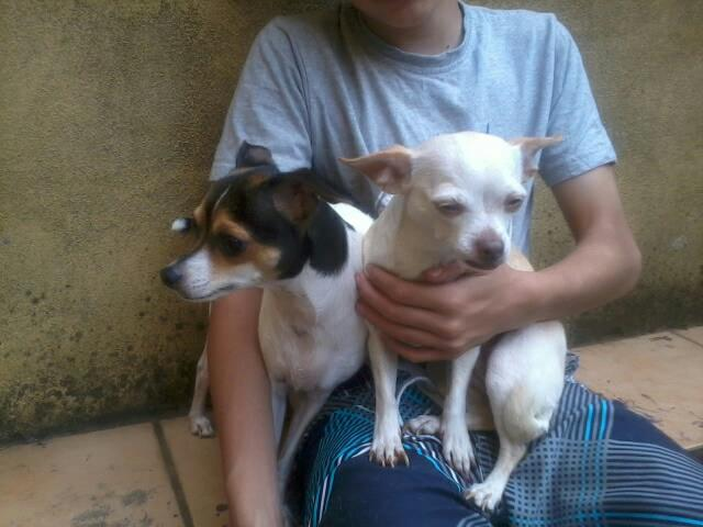 Terrier brasileño y Chihuahueño conviviendo